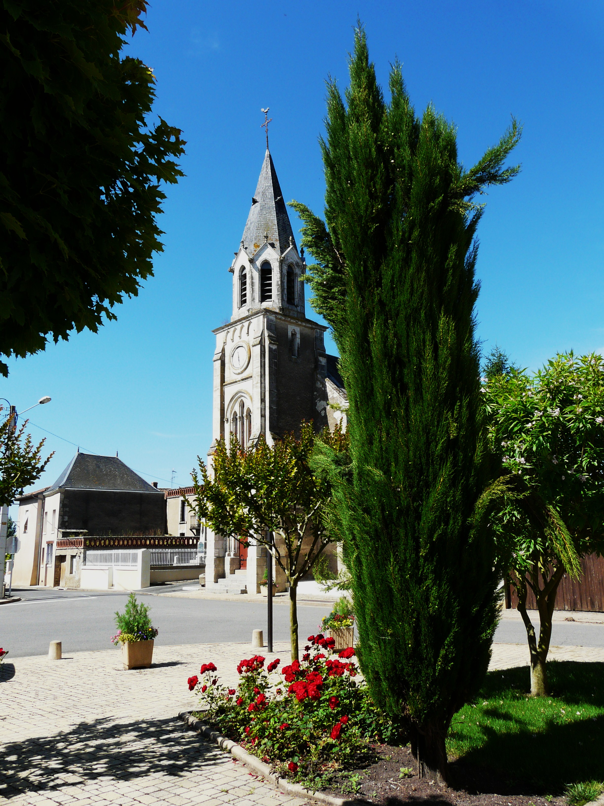 Église de Brie